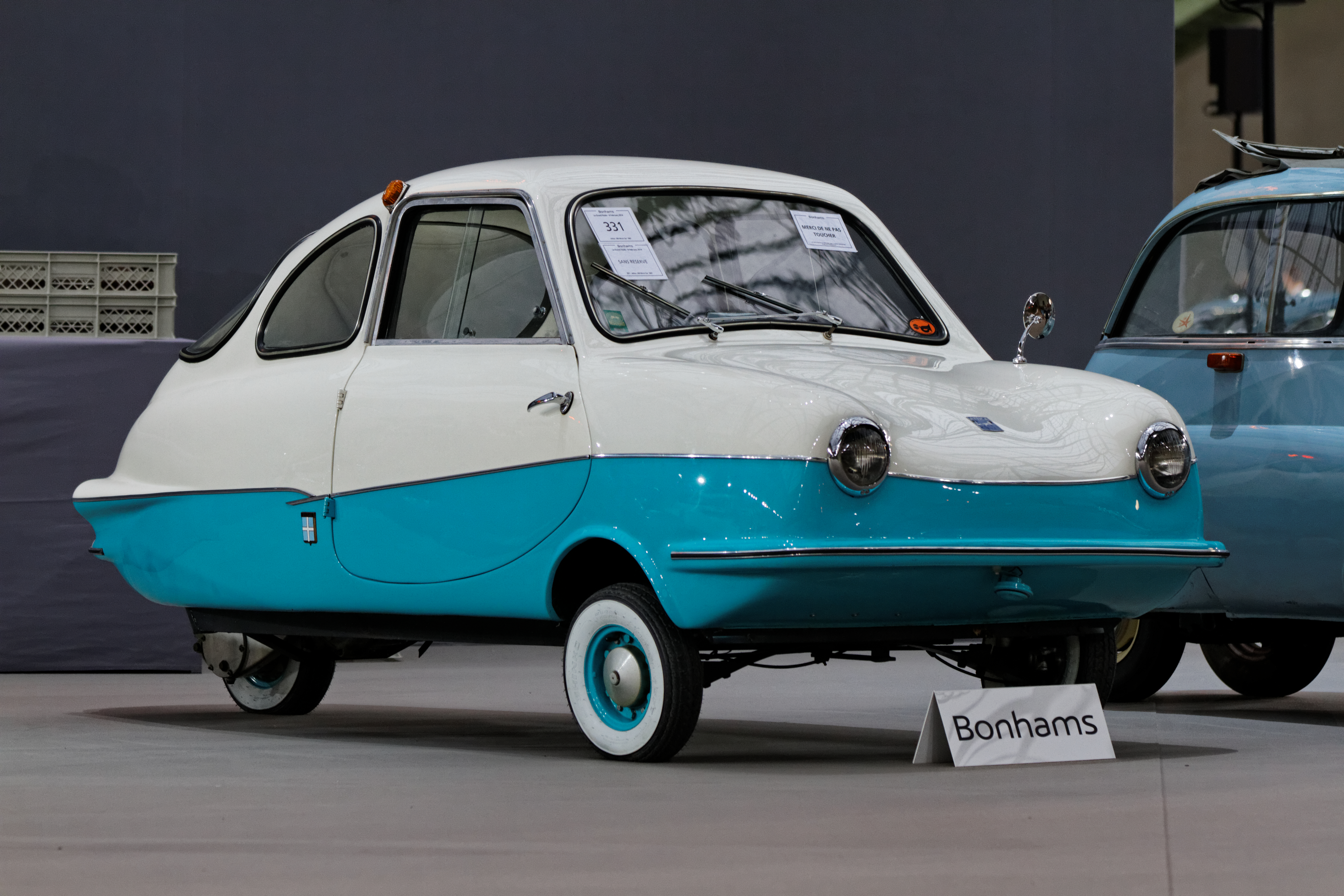 Une Attica 200 Micro Car au Grand Palais lors de la vente Bonhams en février 2014.